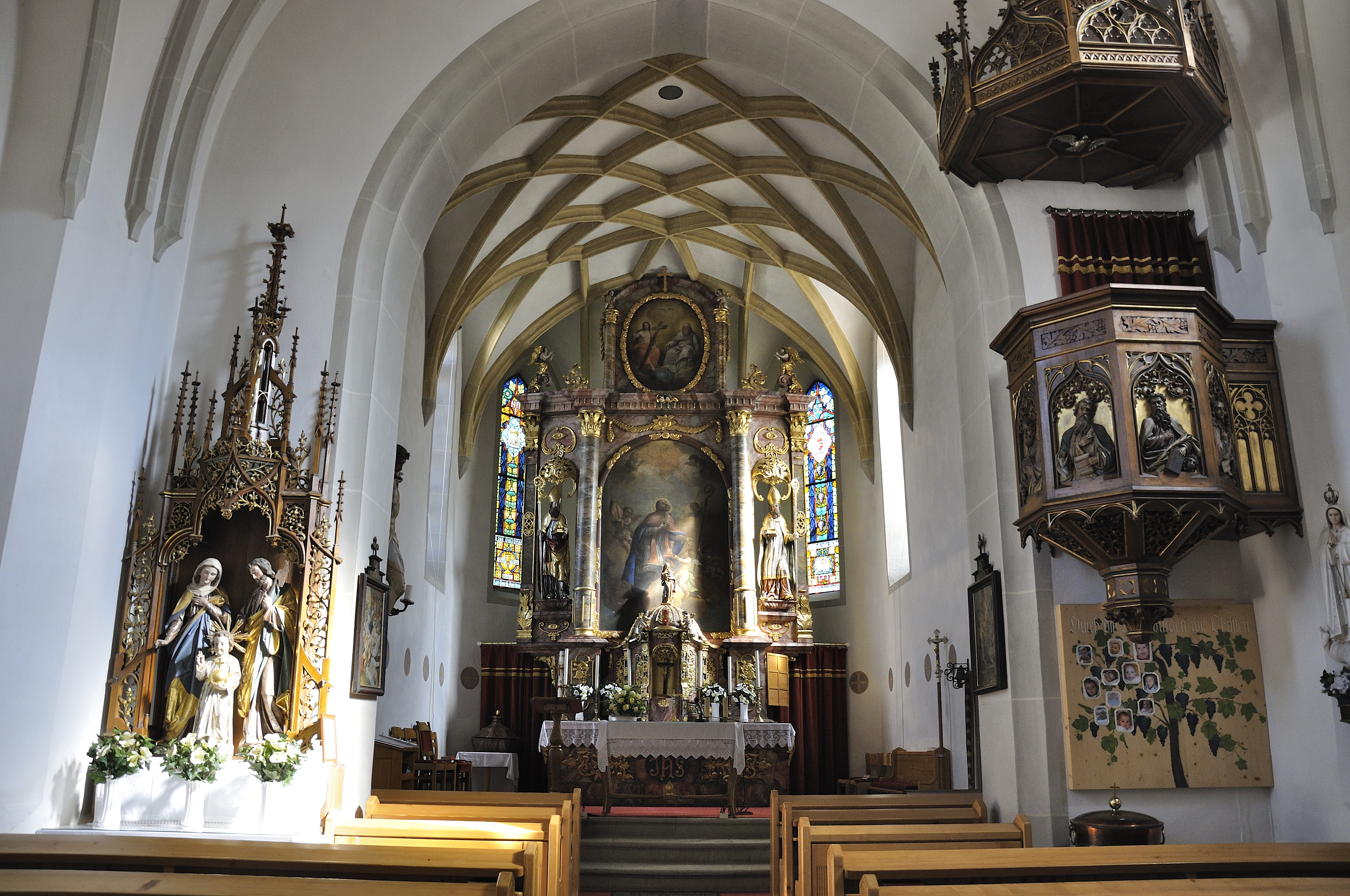 Kath. Pfarrkirche hl. Konrad mit Friedhofsfläche; Chor mit Netzrippengewölbe; Barocker Hochaltar